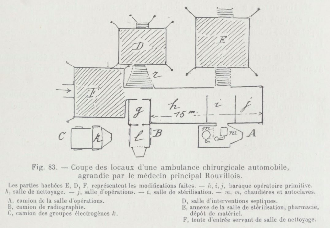 Coupe des locaux d'une ambulance chirurgicale automobile (fig. 83) dans Enseignements chirurgicaux de la Grande guerre (front occidental), par Delorme, Edmond (1847-1929), 1919